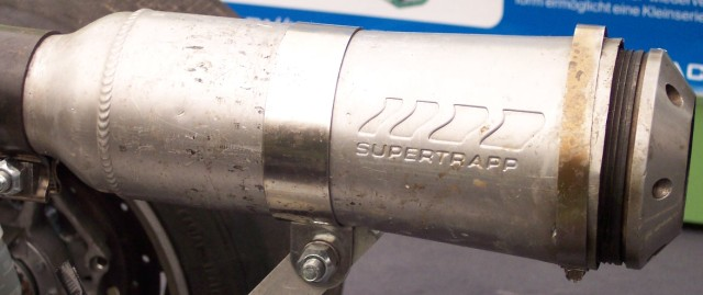 Supertrapp Schalldämpfer